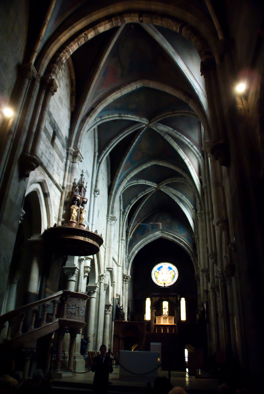 Bencés főapátsági templom (Pannonhalma, Várkerület 1 .) This is a photo of a monument in Hungary. Identifier: 4640